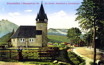 Postkarte mit der evangelischen Kirche in Karpacz